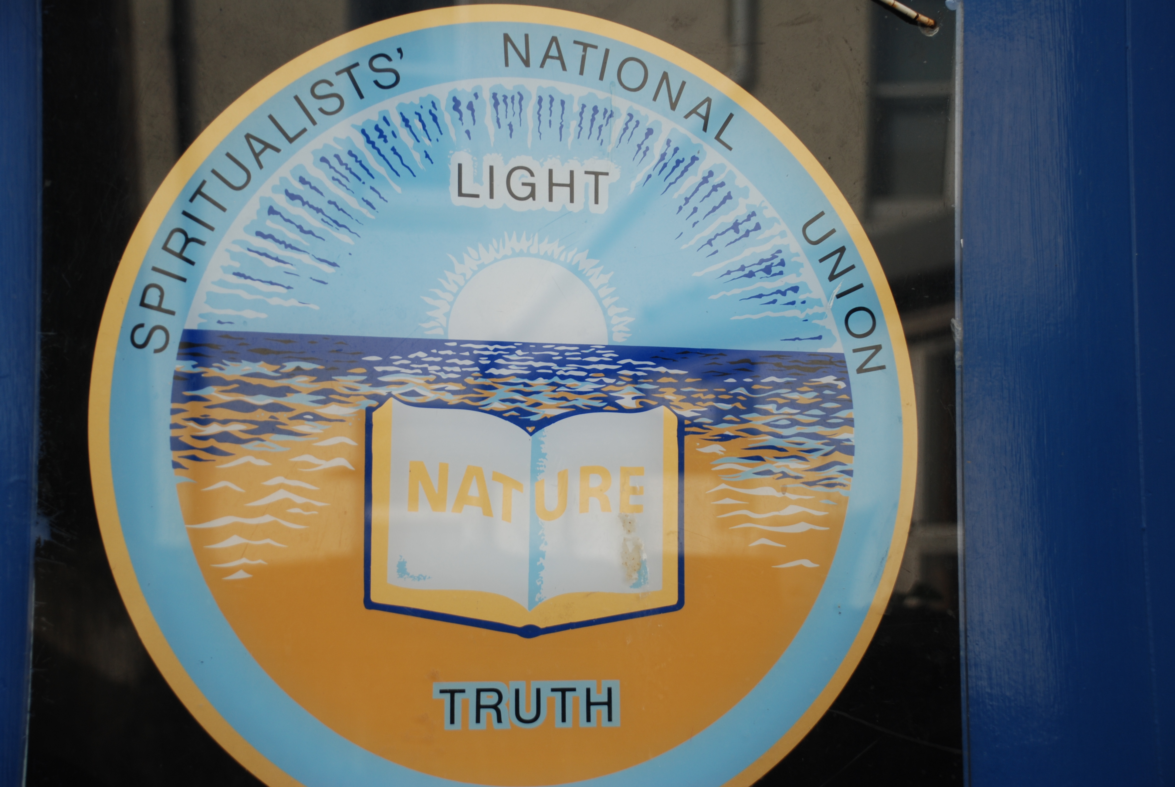 Logo de la "Spiritualist National Union", à l'entrée d'une église spiritualiste d'Edinburg (Ecosse)